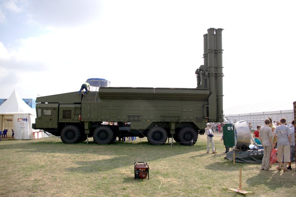 3M-54 Klub missiles based on a MZKT-7930 truck.